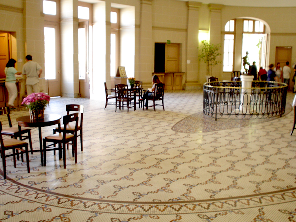 Hall Thermas Antonio Carlos em Poços de Caldas - Minas Gerais - Brasil